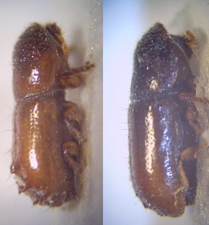 Pityogenes calcographus 40fach Imagines von rechts.